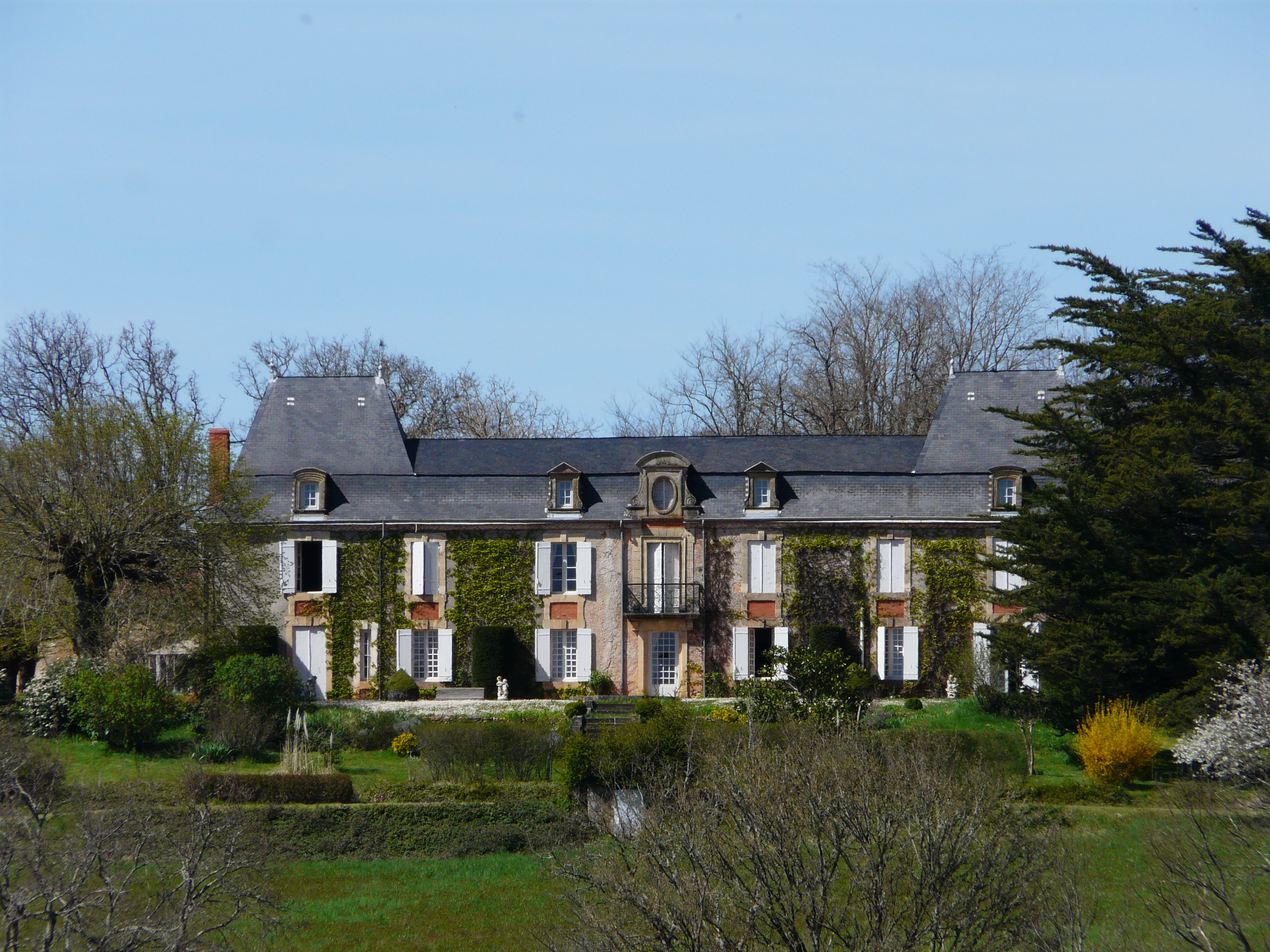 La façade sud du château de la Pommerie, Cendrieux, Dordogne, France.